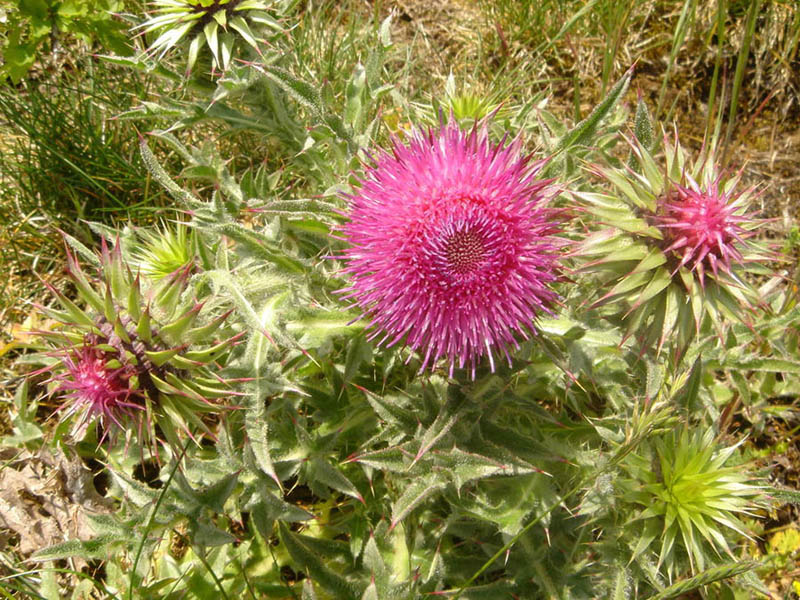 Carduus nutans